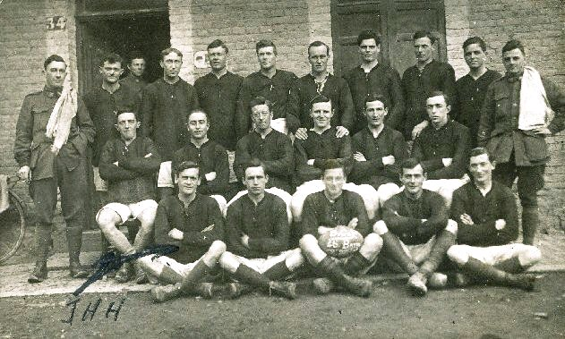 Equipe australienne à Villers-Bretonneux faite de soldats australiens pendant la Première guerre mondiale